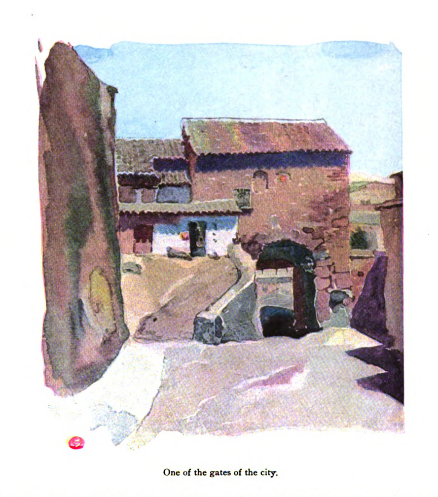 One of the gates of the city (Toledo).